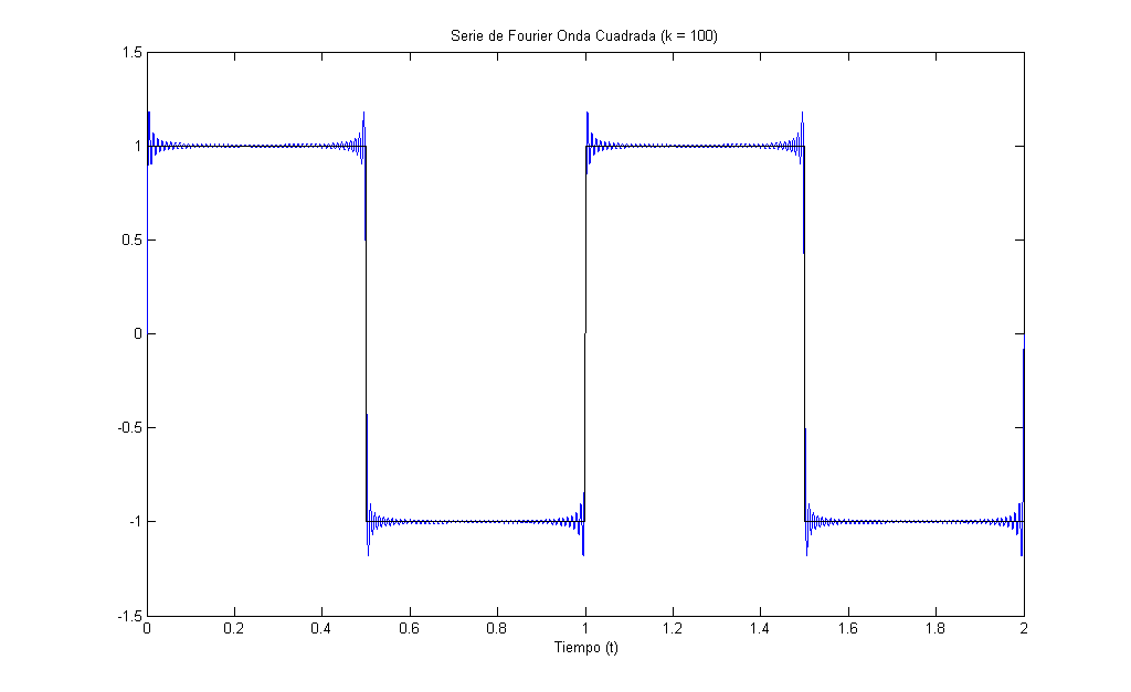 Serie de Fourier Onda Cuadrada k = 100